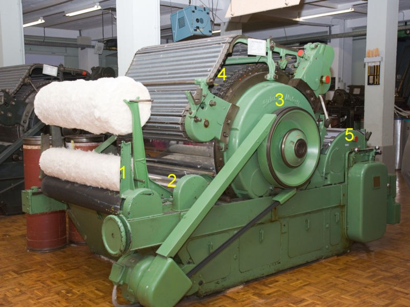 Rieterkarde